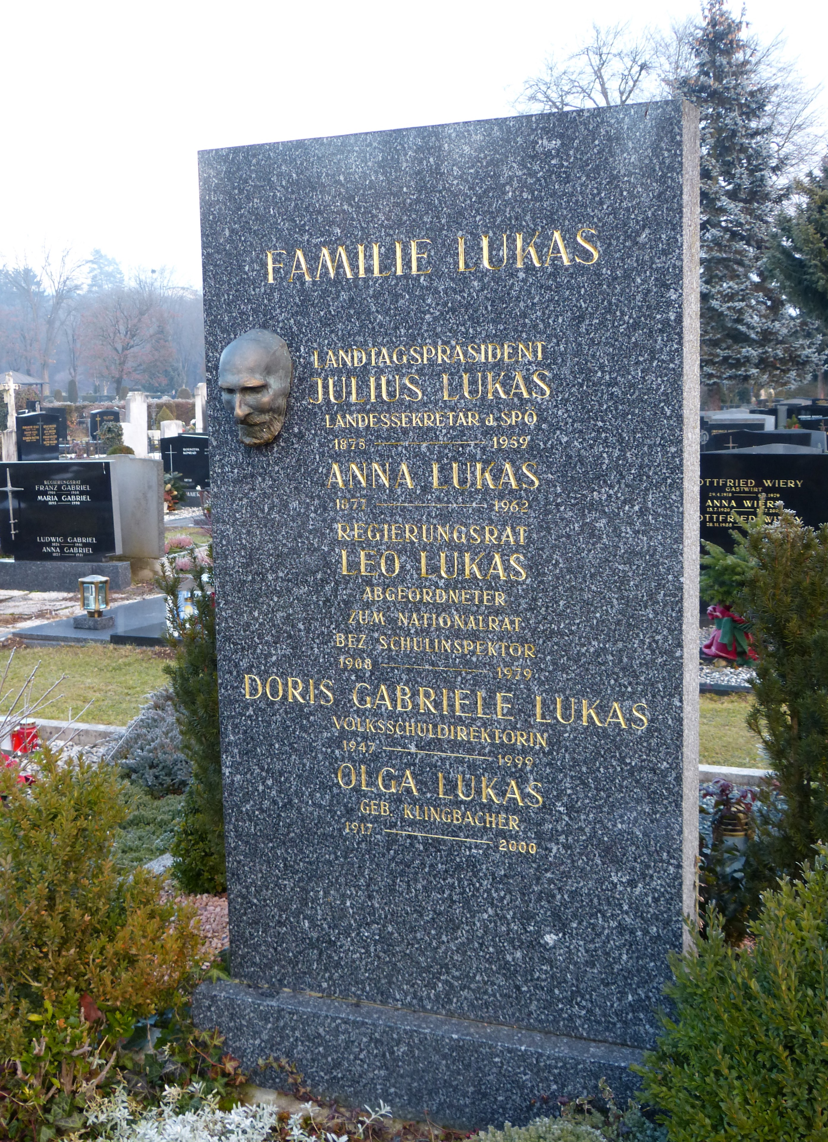 Grabstein am Friedhof Annabichl, Klagenfurt: Leo Lukas (1908-1979, Nationalratsabgeordneter) Julius Lukas (1875-1959, Landtagsabgeordneter)